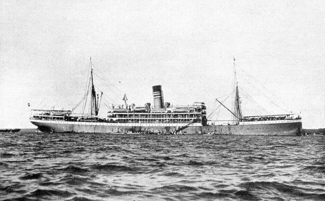 Der Reichspostdampfer KURFÜRST der DOAL